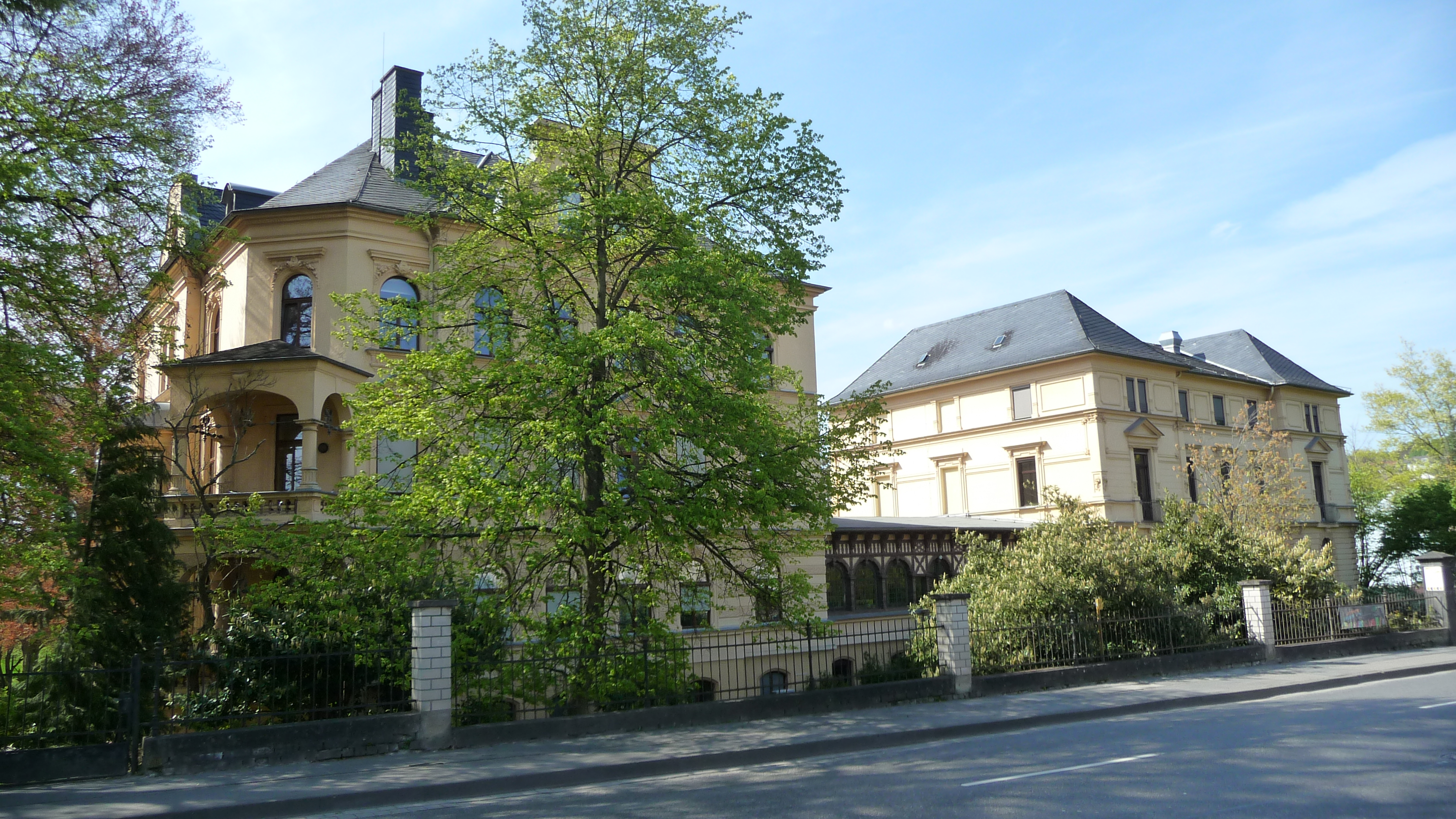 Bendorf-Sayn, Koblenz-Olper-Straße 39, ehem Jakobische Heilanstalt